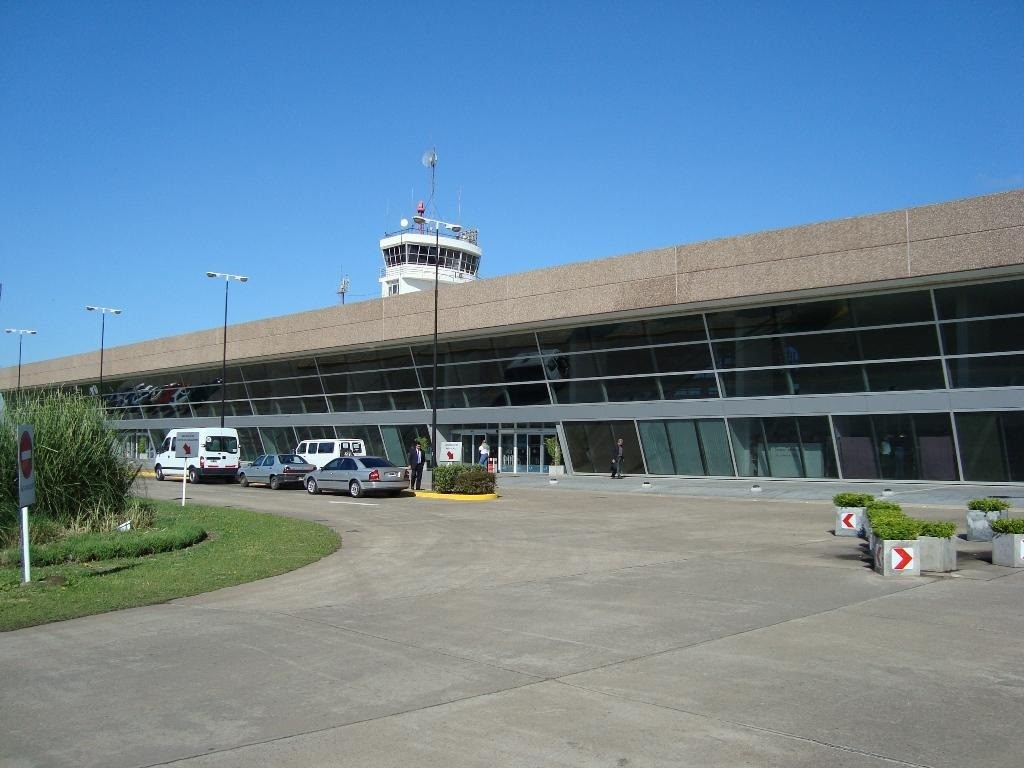 La Terminal aérea actual, Futura terminal de cabotaje.